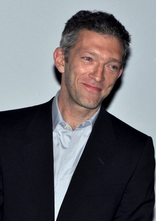 Vincent Cassel à l'avant-première du film "Le Moine"